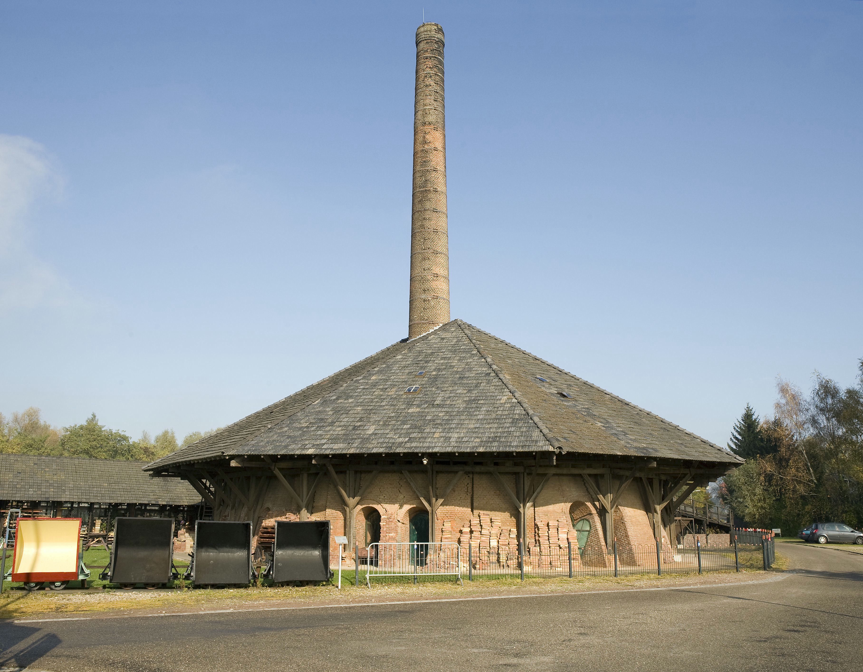 Voormalige pannenfabriek, thans Baksteenmuseum De Panoven: Overzicht van de panoven (opmerking: Gefotografeerd voor portfolie nieuwbouw)